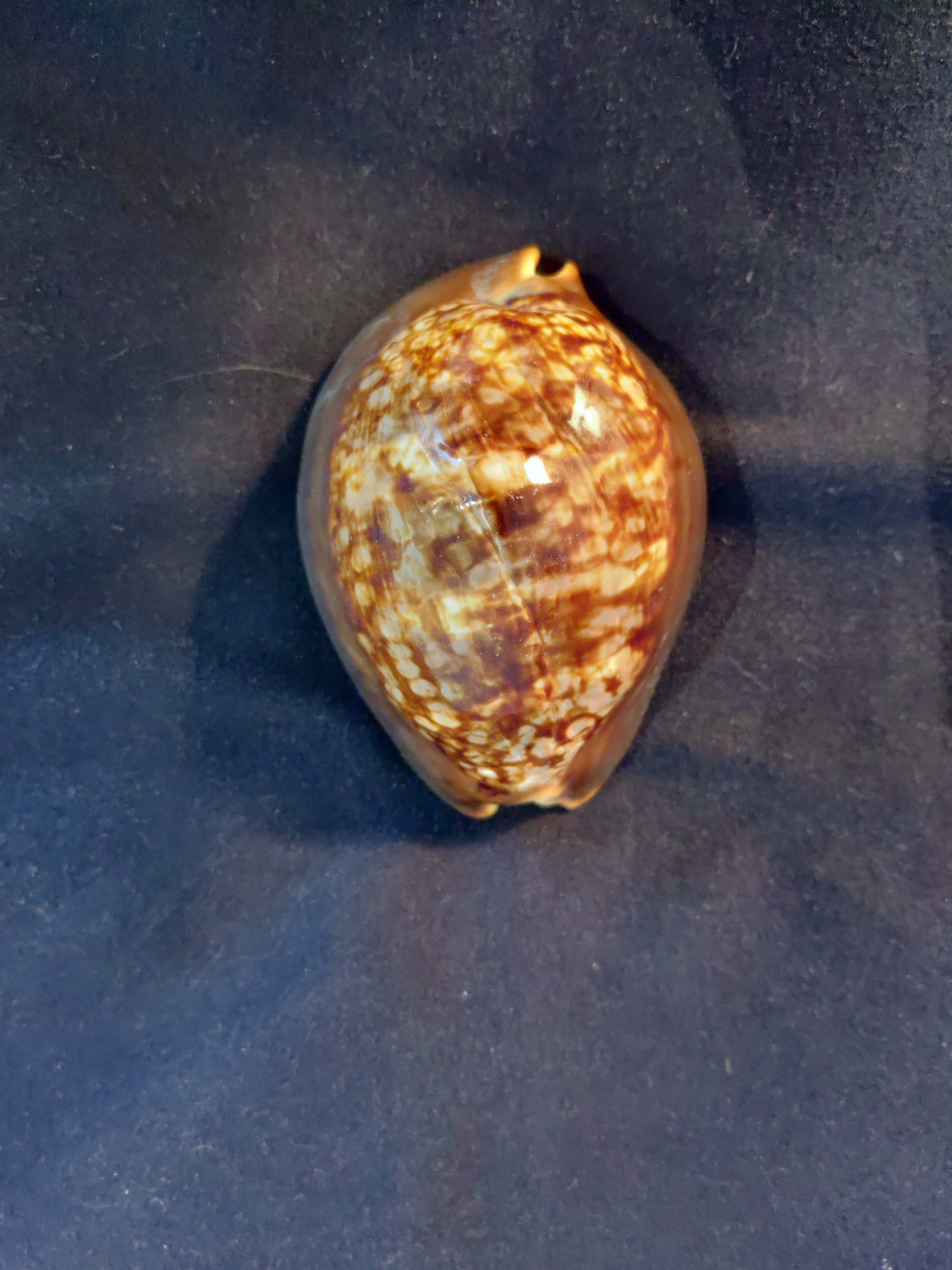 Mauritia mauritiana